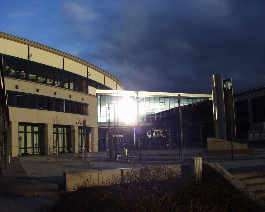 Stadthalle (links) und Rathaus Stadtallendorf